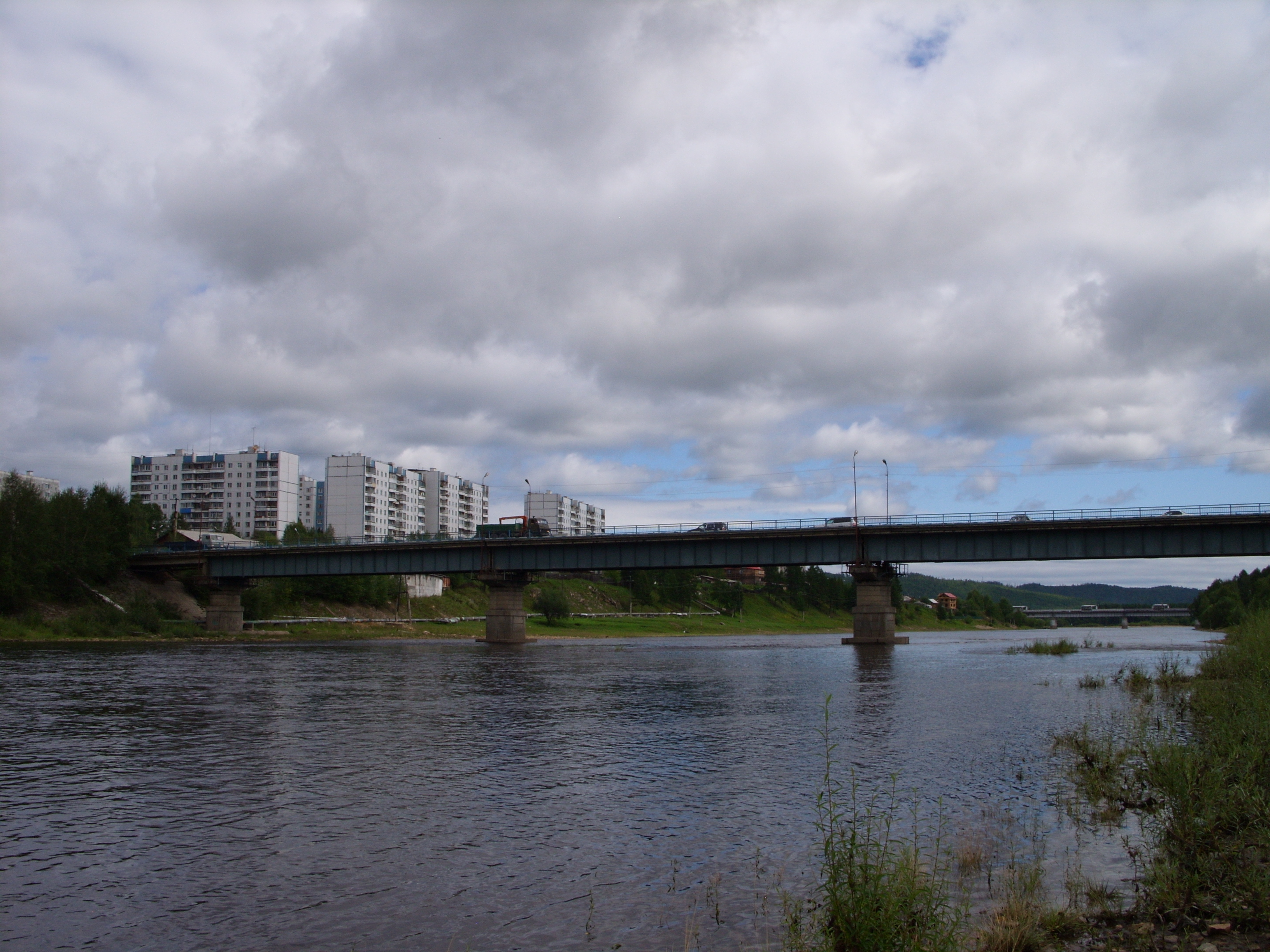 Город Тында летом 2011 года. По дороге в Благовещенск